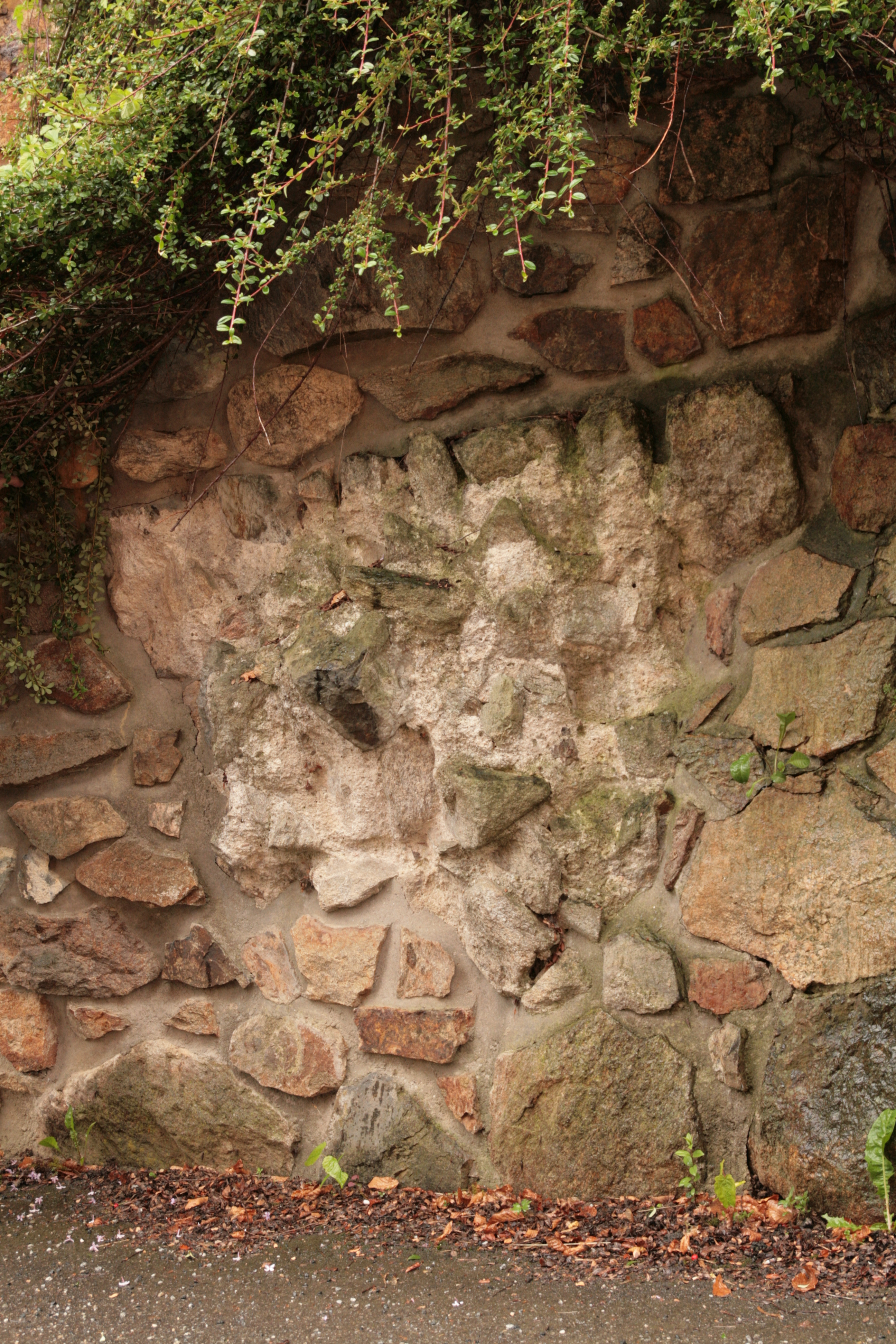 Kamenná terasa parcely č. 134, skrývající zbytky původního opevnění někdejšího hradu v Přibyslavi. Detail.